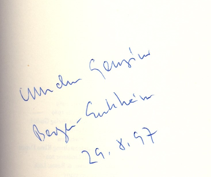 Autograph von Wilhelm Genazino, 1997, in Ffm-Bergen-Enkheim.